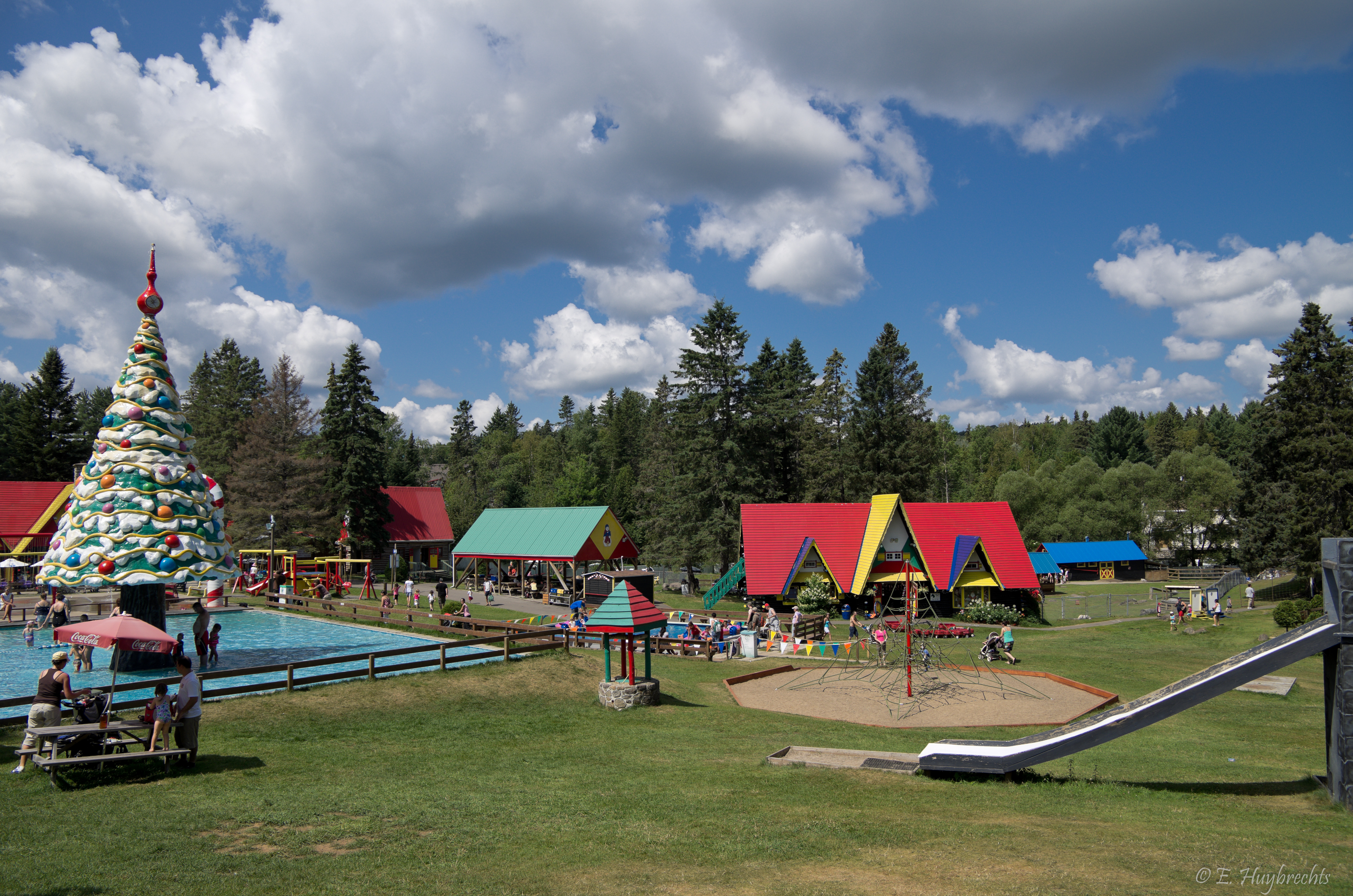 Santa Claus Village in summer